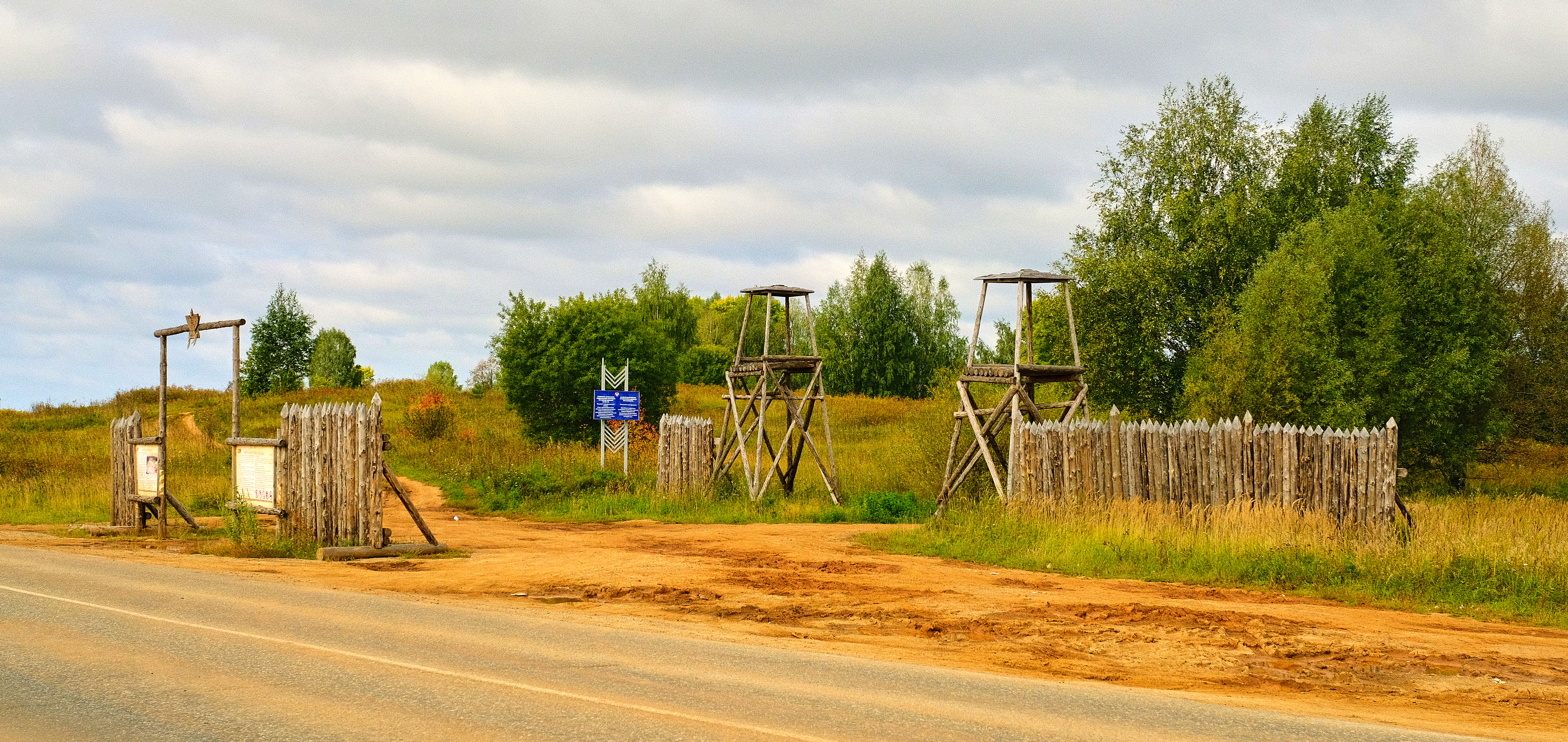 Въезд на гору Солдырь (городище Индакар) около Глазова